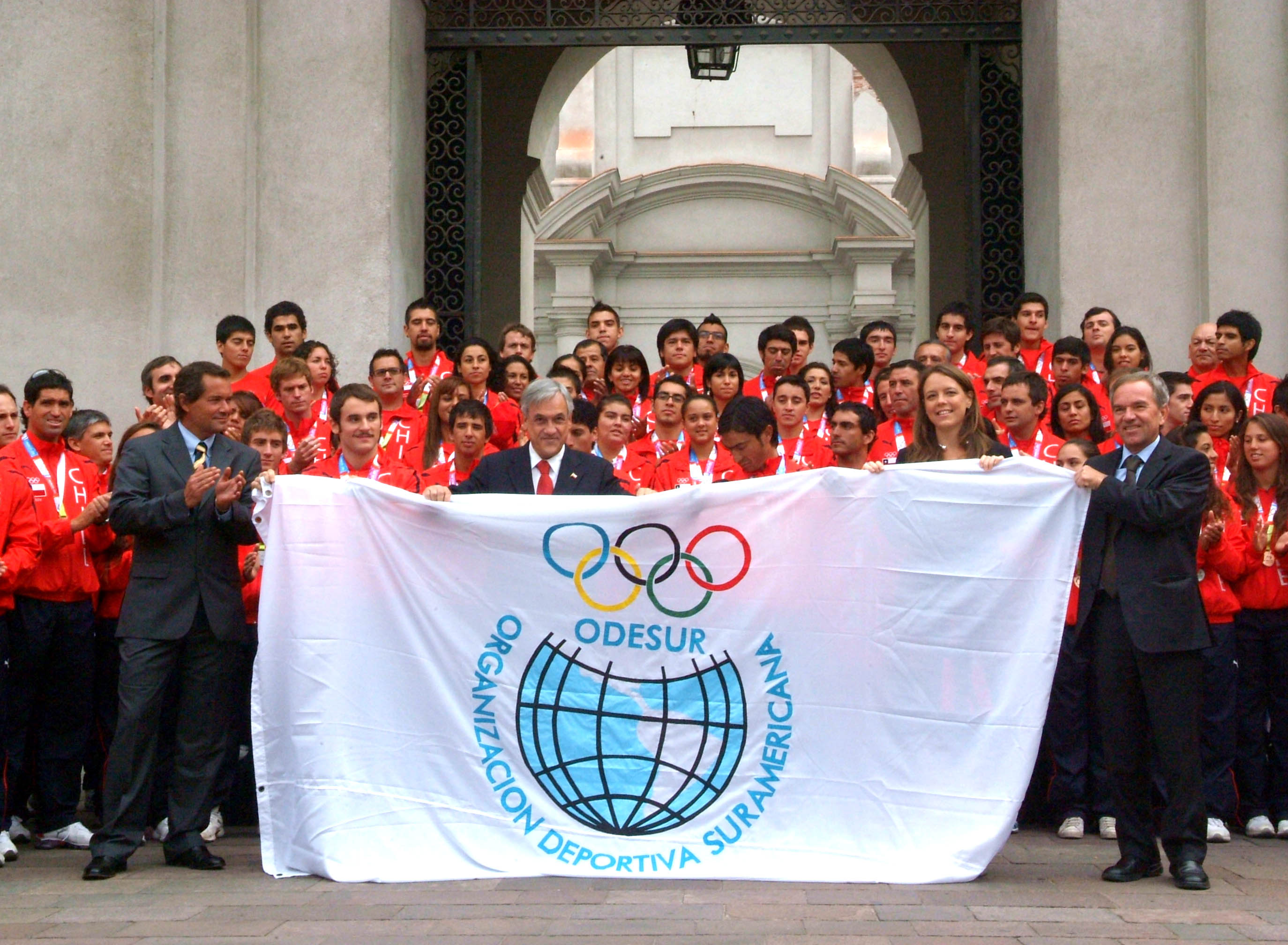 La Ministra Secretaria General de Gobierno,Ena von Baer,saluda a los medallistas y atletas que participaron en los IX Juegos Suramericanos de Medellín.Palacio de La Moneda.Guillermo Arce F.